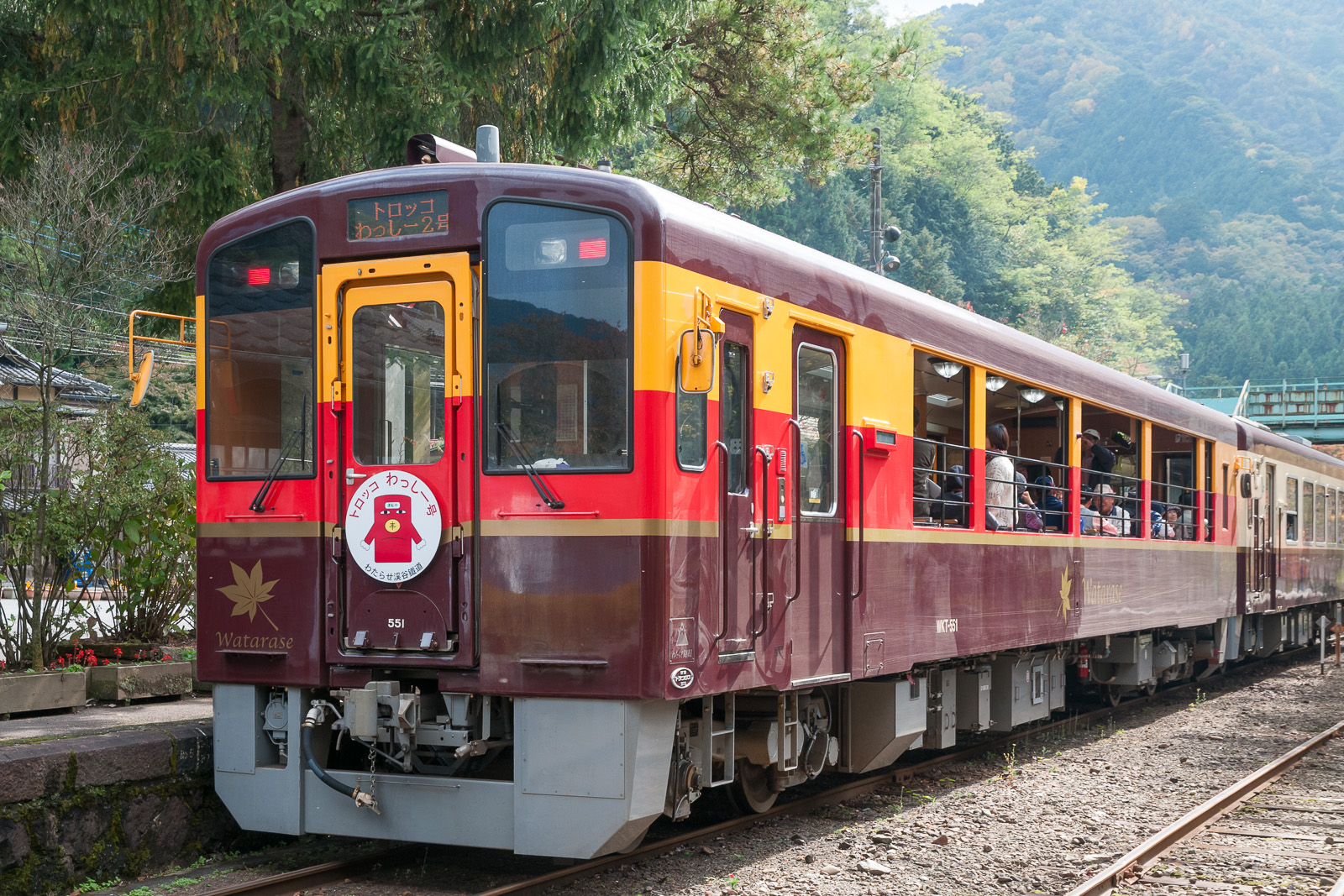 わたらせ渓谷鉄道WKT551、沢入駅。